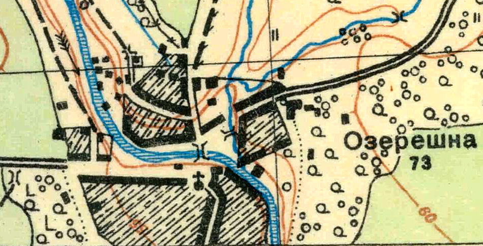 Топографическая карта Ленинградской области, квадрат О-36-25-Б-г (Озерешна), деревня Озерешно